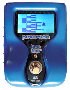 StroboStomp